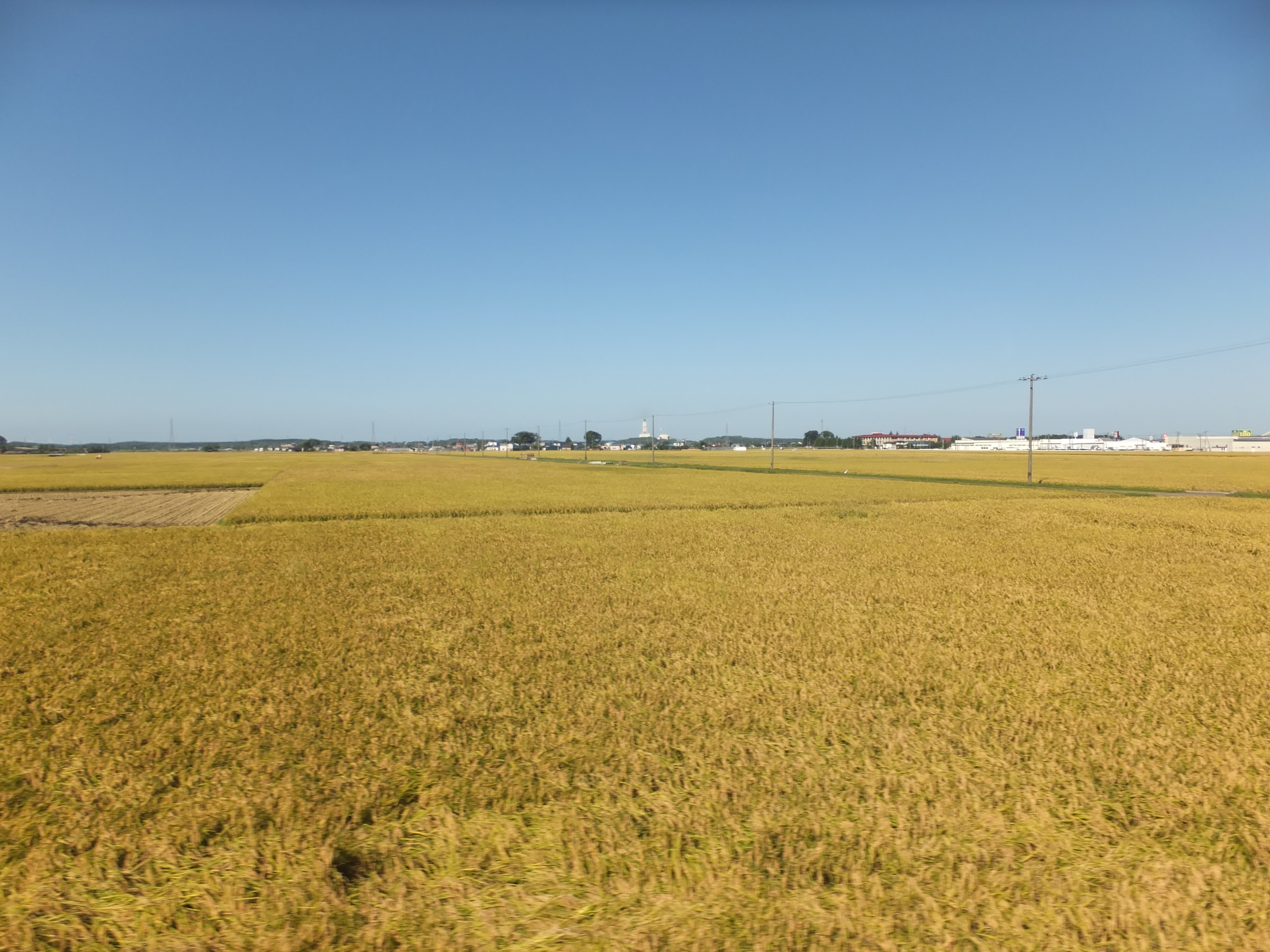 能代平野の田園風景。奥羽本線車中より撮影